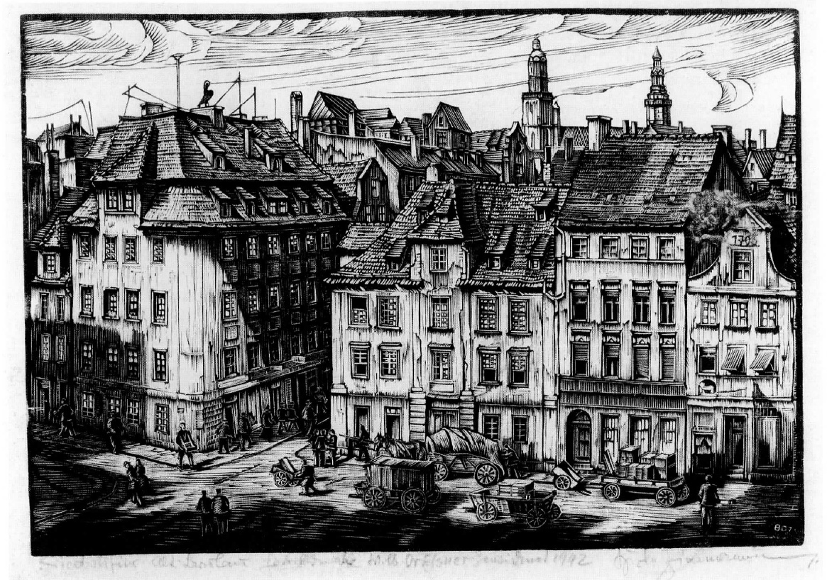 Wrocław - Stare Miasto Skrzyżowanie dzisiejszej ulicy Widok (z lewej) z Menniczą (ulica na pierwszym planie) widziany z góry z południowego wschodu na północny zachód. Widoczna na drzeworycie zabudowa została w znacznej części zlikwidowana już w 1938 w związku z przebudową urbanistyczną miasta. Nazwa grafiki - Siehdichfür (dosłownie "Uważaj" albo "Rozejrzyj się") - to do 1945 nazwa dzisiejszej ulicy Widok powstała podczas epidemii dżumy w 1525, kiedy w jednym z tutejszych budynków izolowano chorych